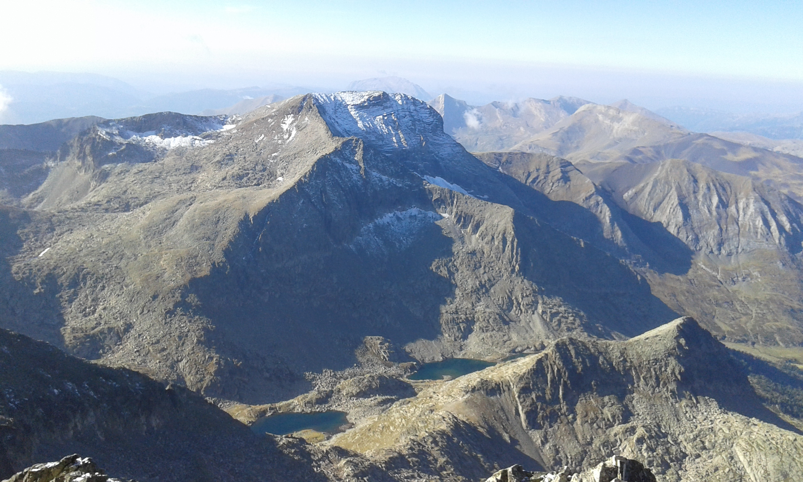 Vallibierna i Culebres des del cim del Russell